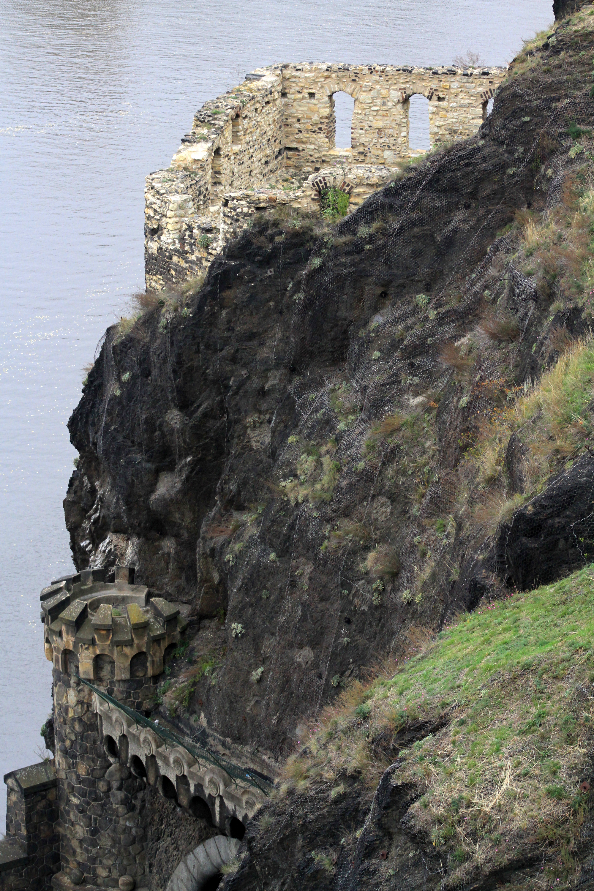 Pevnost Vyšehrad, Praha 2-Vyšehrad, Soběslavova 14/1, V pevnosti 16/2, 35/11, K rotundě 16/3, 81/6, 82/8, 90/12, 91/14, 92/16, 100/10, Štulcova 89/1, 102/2, 69/3